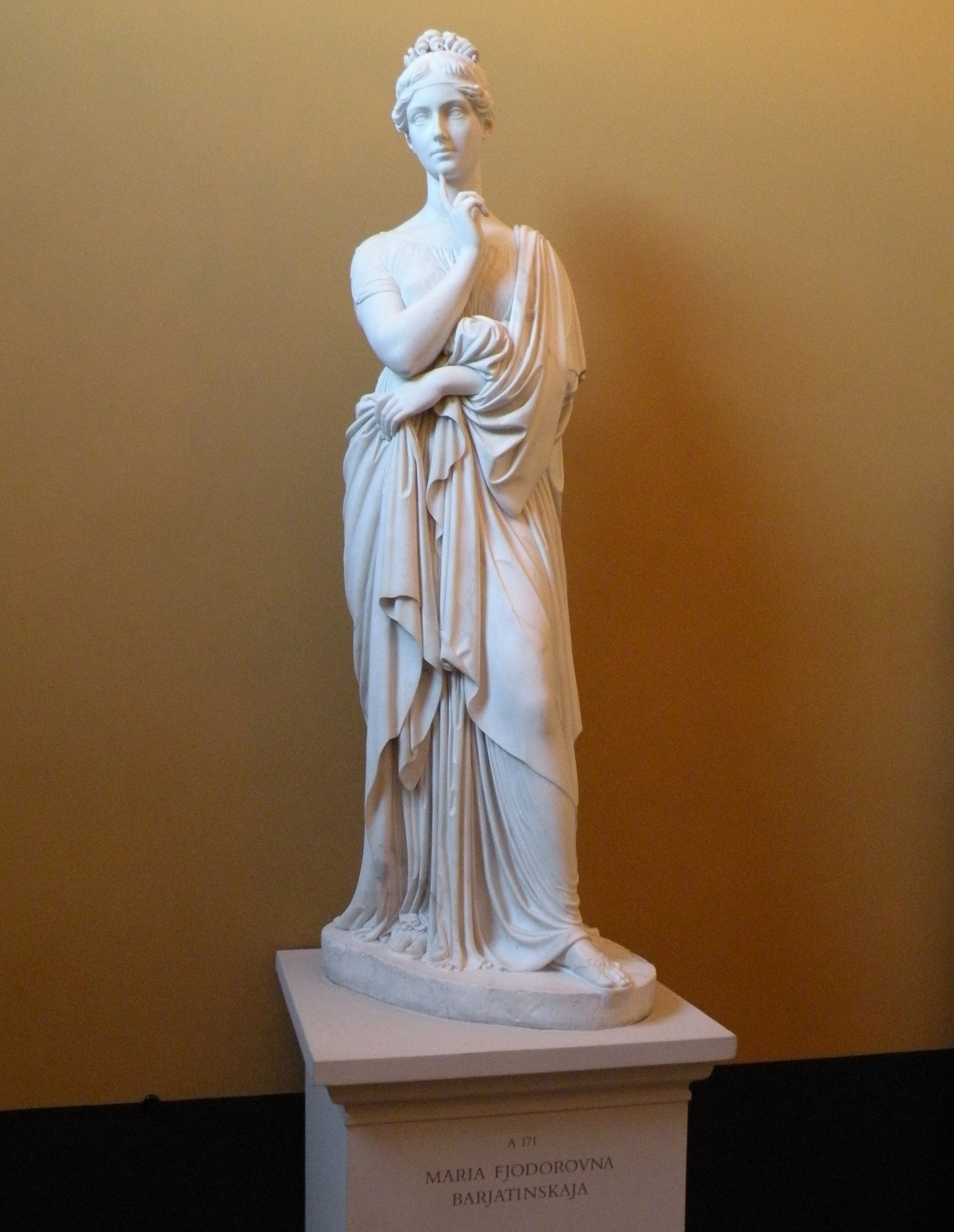 ".Экспонат музея Торвальдсена